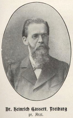 Heinrich Gassert (1857-1928), deutscher Arzt und Dichter